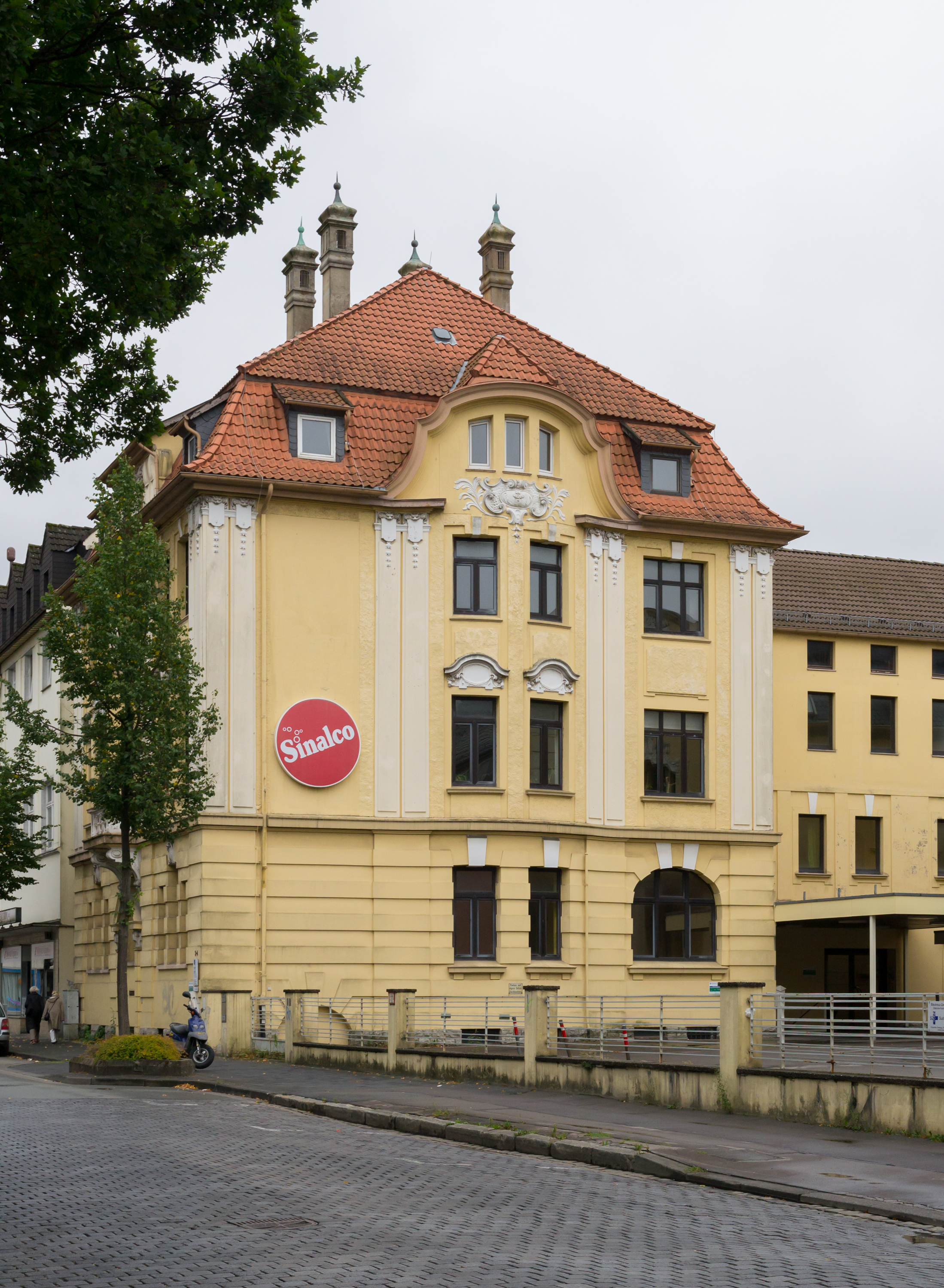 Ehemaliges Sinalco-Gebäude in der Bahnhofstraße in Detmold